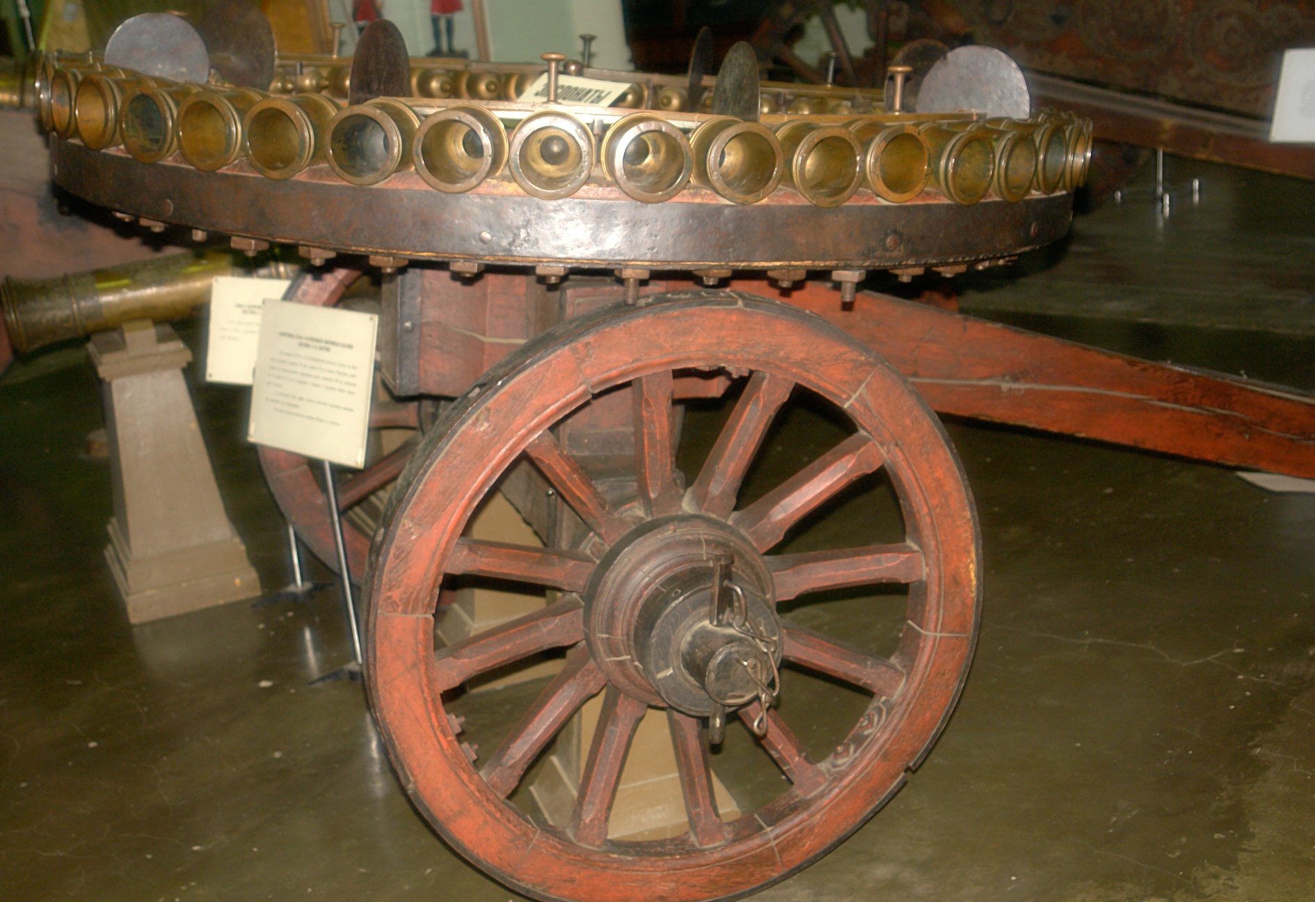 3-фунтовая (76-мм) 44-ствольная мортирная батарея системы А. К. Нартова. Изготовлена в 1754 г в Санкт-Петербургском арсенале. Состоит из бронзовых мортирок калибром 76 мм и длиной 23 см каждая. Мортирки, укреплённые на горизонтальном деревянном круге диаметром 185 см, разделены на 8 секций по 5 или 6 мортирок в каждой и соеденены общей пороховой полкой. В хоботовой части лафета имеется винтовой подъёмный механизм для придания угла возвышения. Массового распространения подобные батареи не получили.